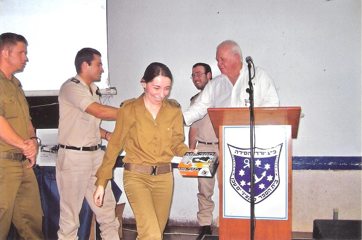 חלוקת שי עמותת בוגרי קציני ים למגשימי קצונה צעירים 2006